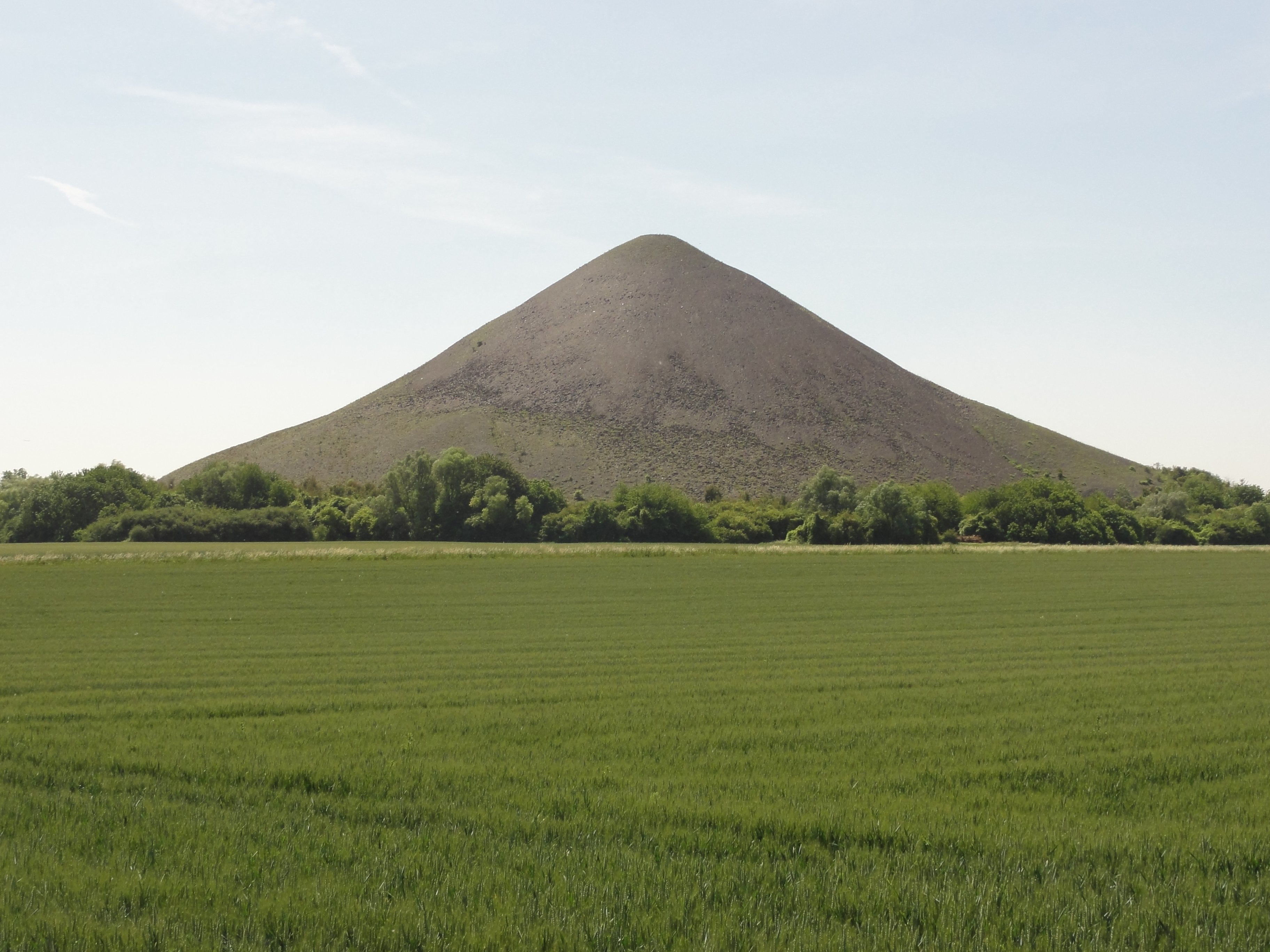 Terril n° 93 dit 21 Nord de Courrières, fosse n° 21 - 22 de la Compagnie des mines de Courrières dans le bassin minier du Nord-Pas-de-Calais, Harnes, Pas-de-Calais, Nord-Pas-de-Calais, France. Le terril no 93 est inscrit sur la liste du patrimoine mondial de l'Unesco le 30 juin 2012 et y constitue en partie le site no 51.